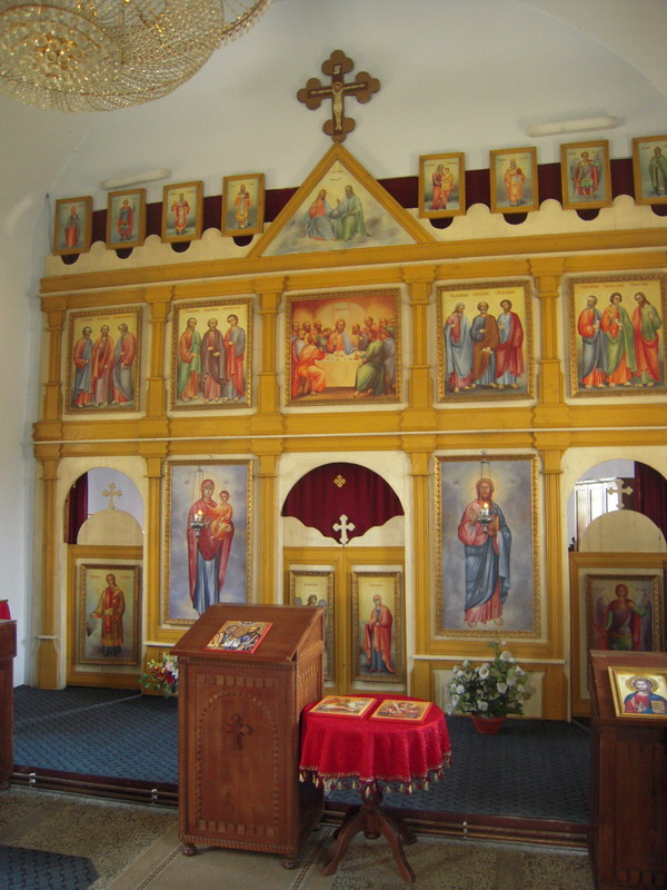 Unutrašnjost_crkve_u_Živinicima